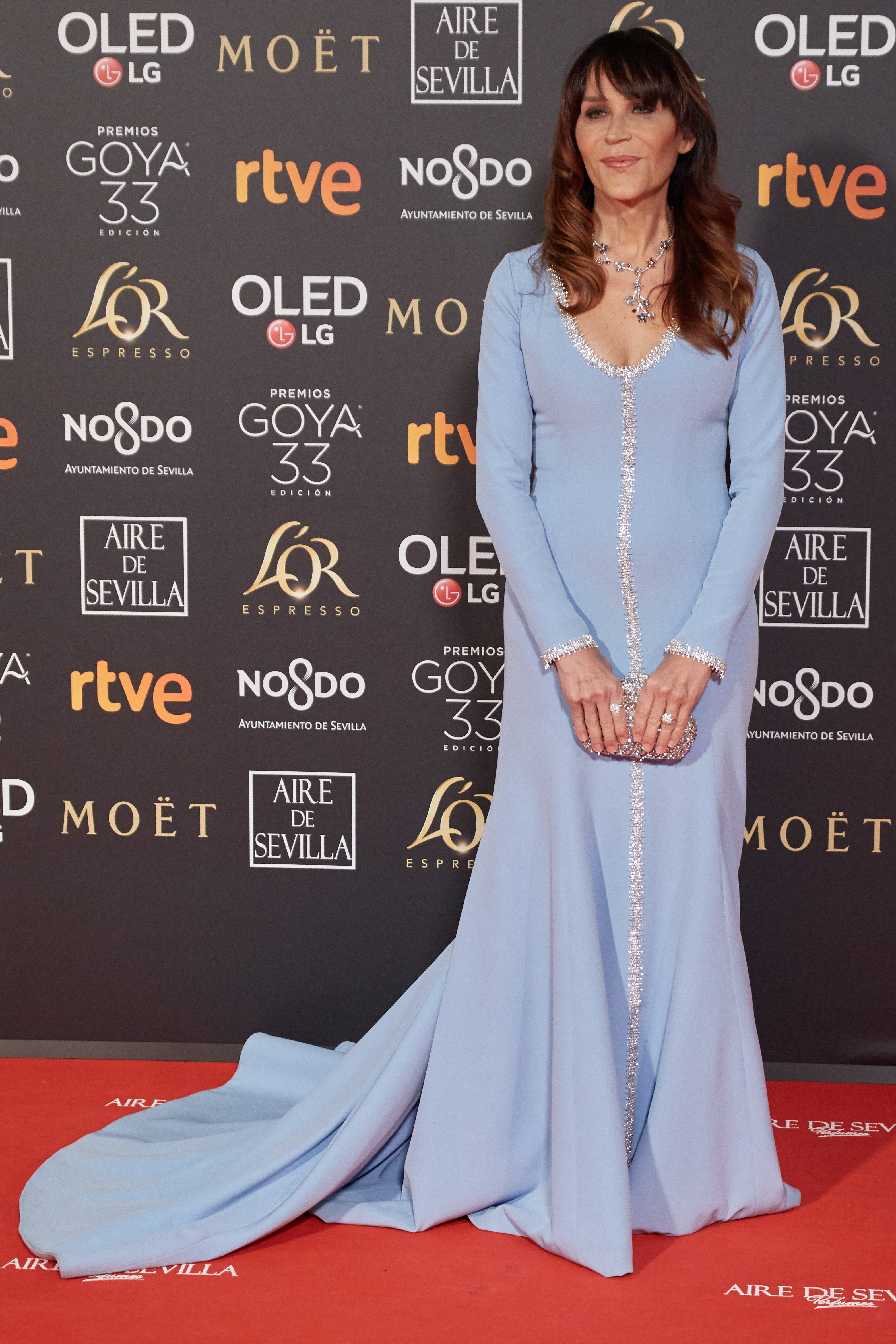 Antonia San Juan en la alfombra roja de los Premios Goya celebrados en Sevilla en Febrero 2019